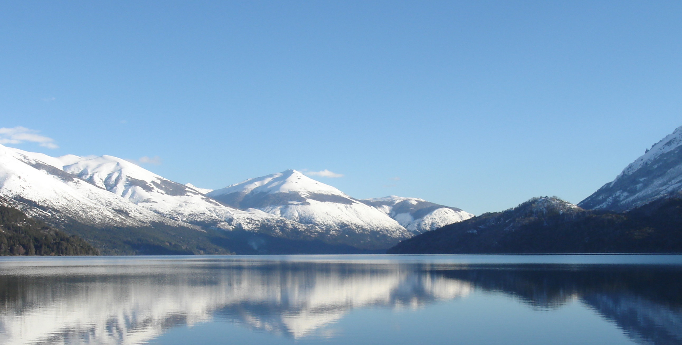 Calma total en Lago Gutiérrez, Bariloche